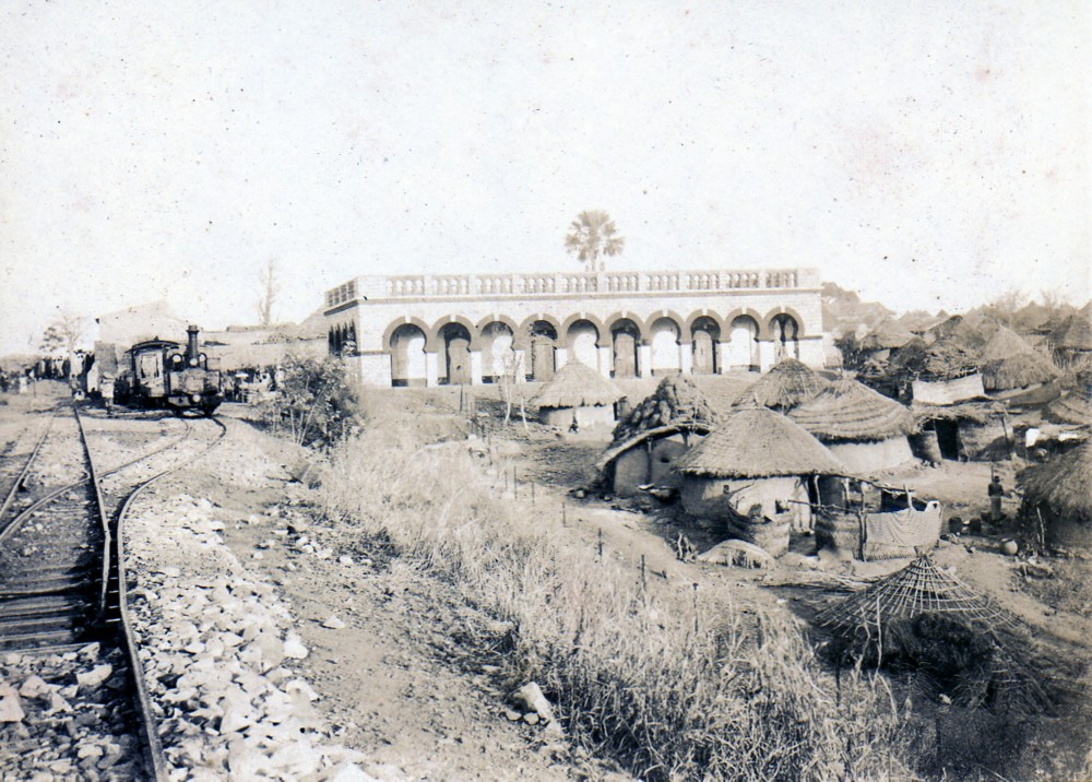 La gare primitive de Médine peu après l'inauguration